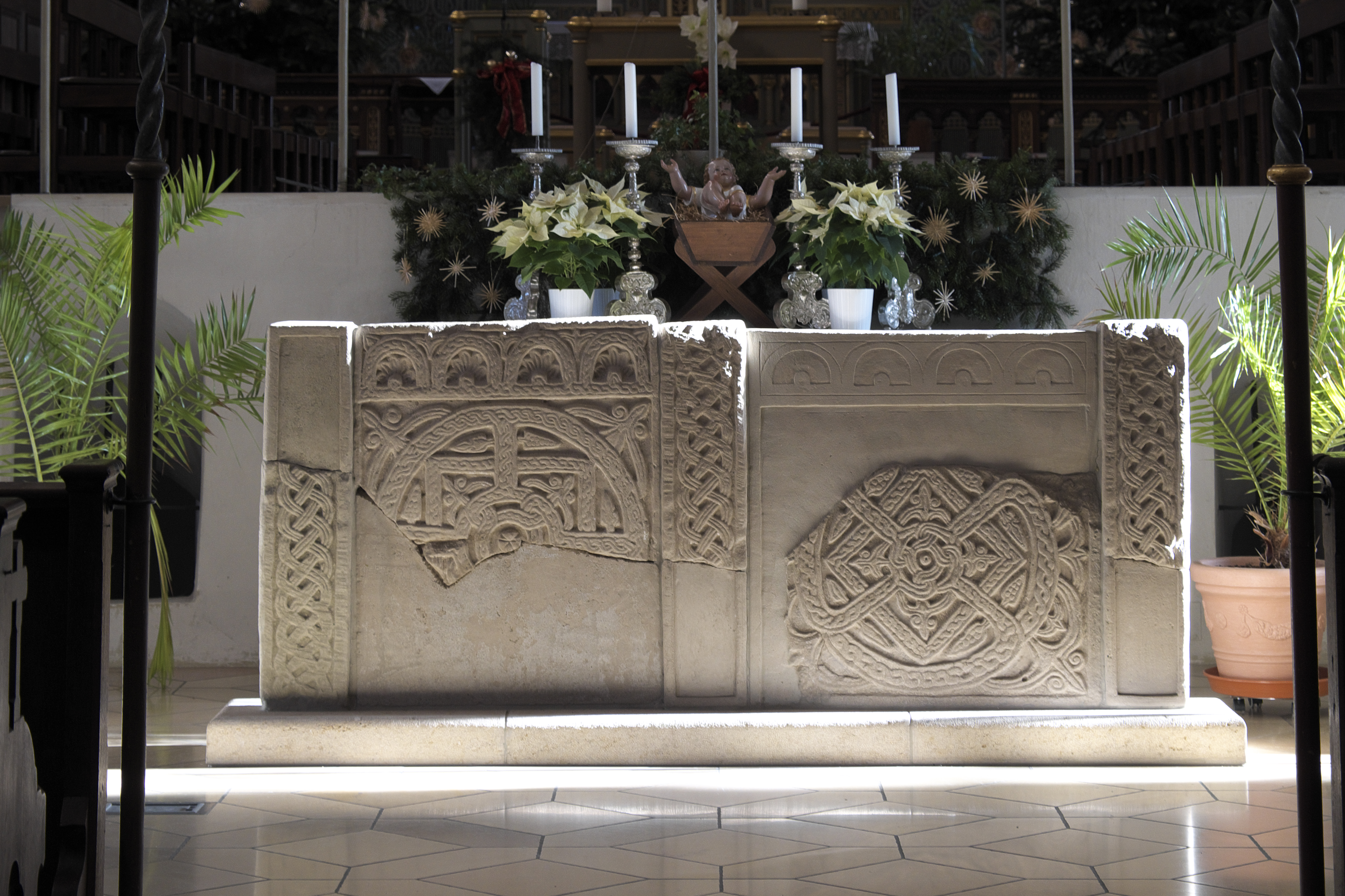 Katholische Pfarr-, ehemalige Kollegiatsstiftskirche St. Arsatius in Ilmmünster im Landkreis Pfaffenhofen an der Ilm (Bayern/Deutschland), karolingische Chorschranken aus dem 8./9. Jahrhundert (Nachbildung ?)